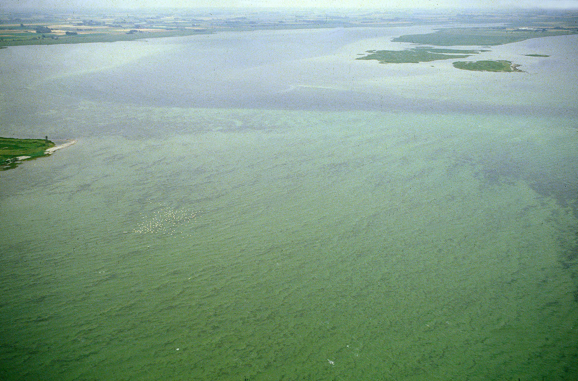 Foteviken, Skåne, Sverige sedd från mynningen ut i Höllviken.